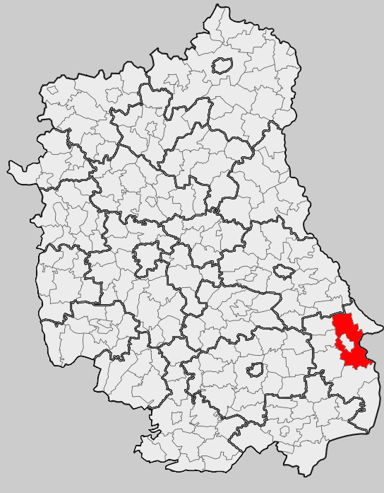 Map of gmina Hrubieszów (rural), Hrubieszów county, Lublin voivodship Mapa gminy Hrubieszów (wiejska), powiat hrubieszowski, województwo lubelskie